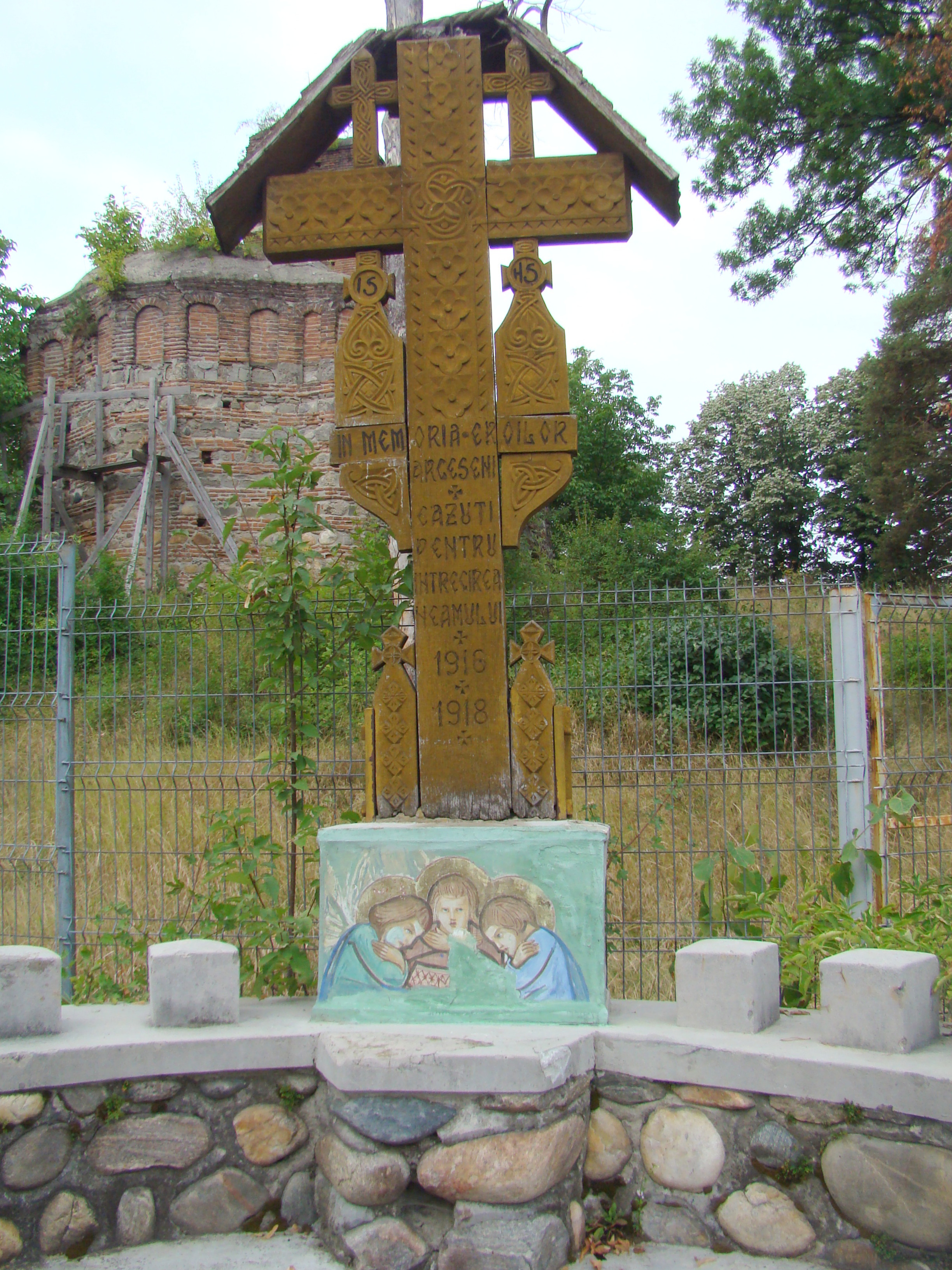 Crucea Eroilor 1916 - 1918 (Curtea de Argeș, Str. Sân Nicoară 1) 03